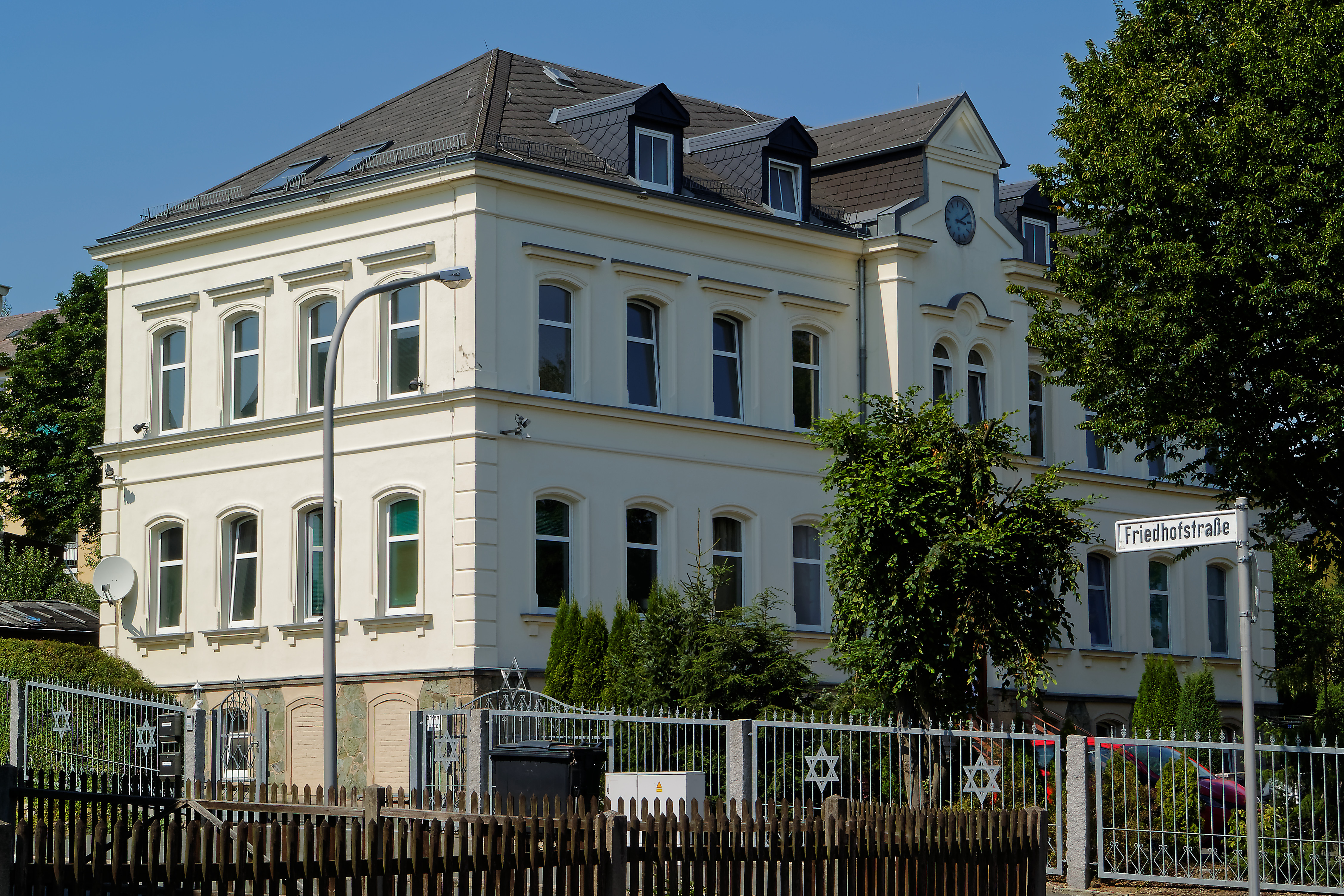 Schulhaus in Hof/Saale mit Denkmal-Nr. D-4-64-000-262, Ansicht von der Oberkotzauer Straße.Zweigeschossiger Walmdachbau auf hohem Kellergeschoss mit Polygonalmauerwerk, Treppenhausrisalit und Uhrenerker, Hausteingliederung, neuklassizistisch, Ende 19. Jahrhundert This is a photograph of an architectural monument.